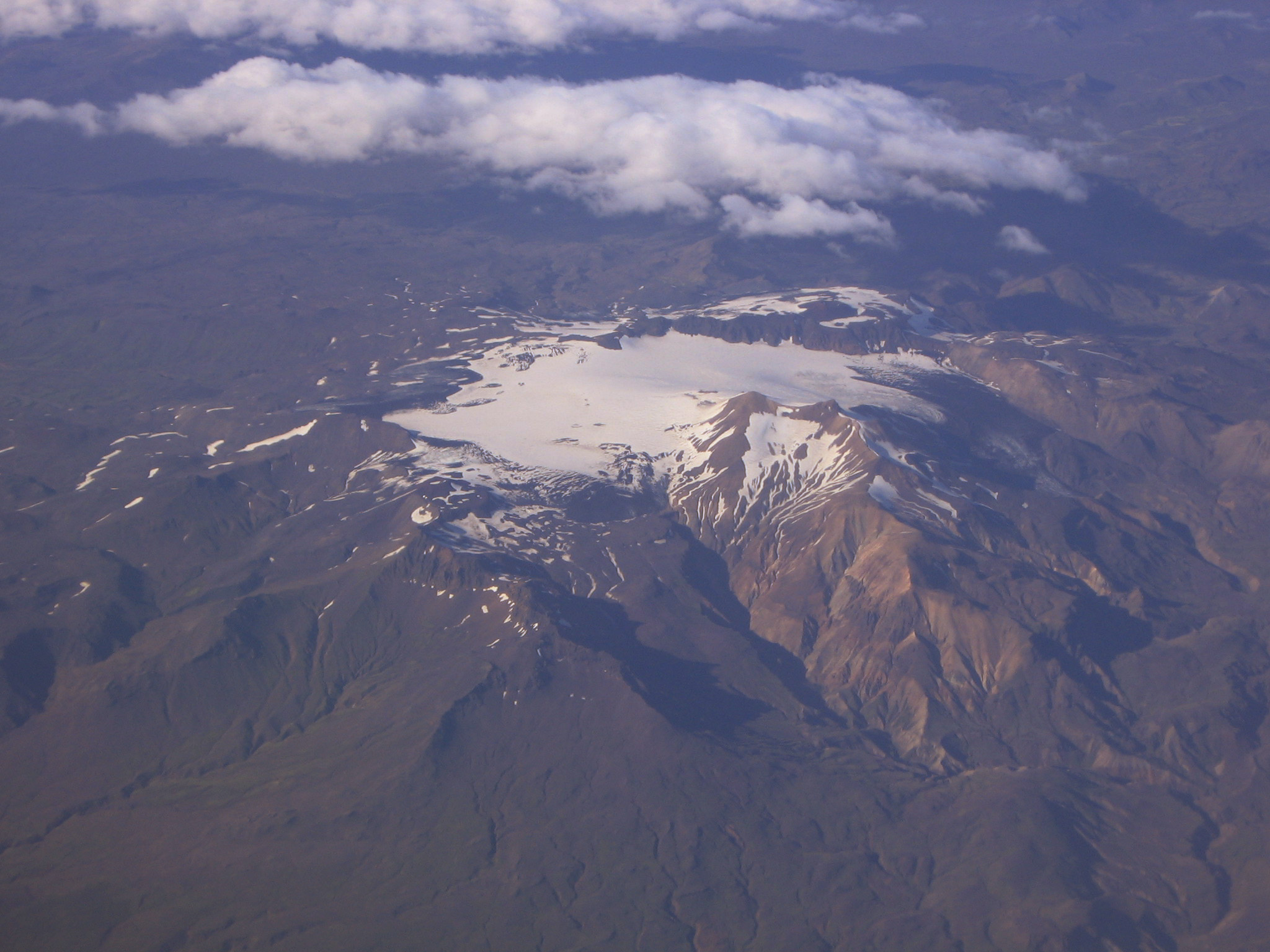 Tindfjallajökull seen from aeroplane